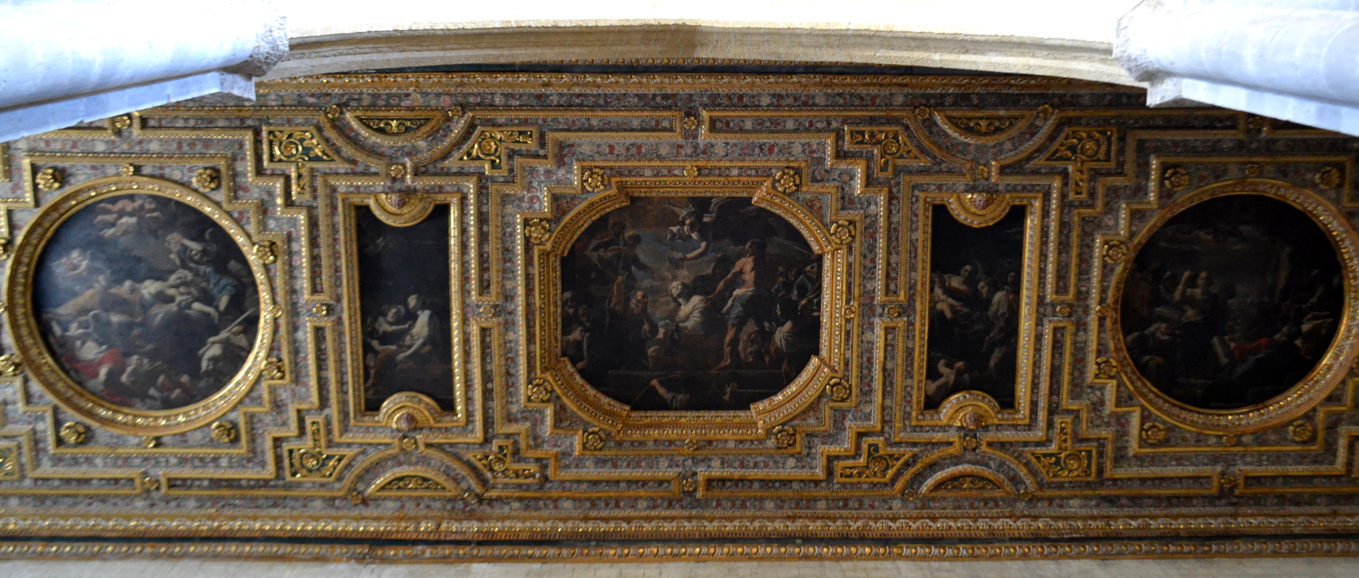 Chiesa di San Pietro a Majella di Napoli - Volta del transetto